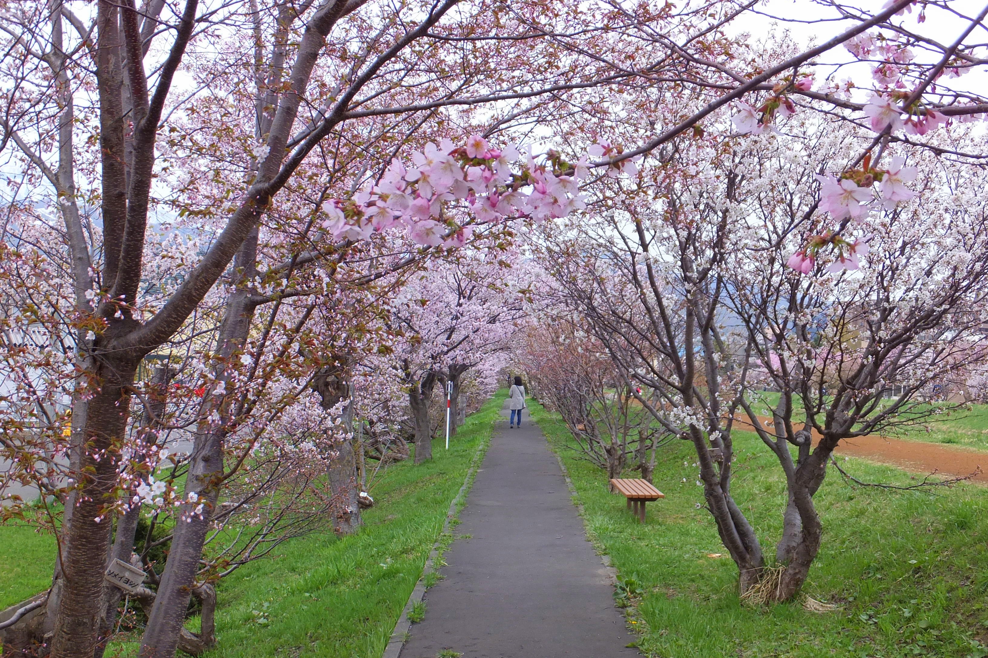 軽川河川敷(garu River riverbed)